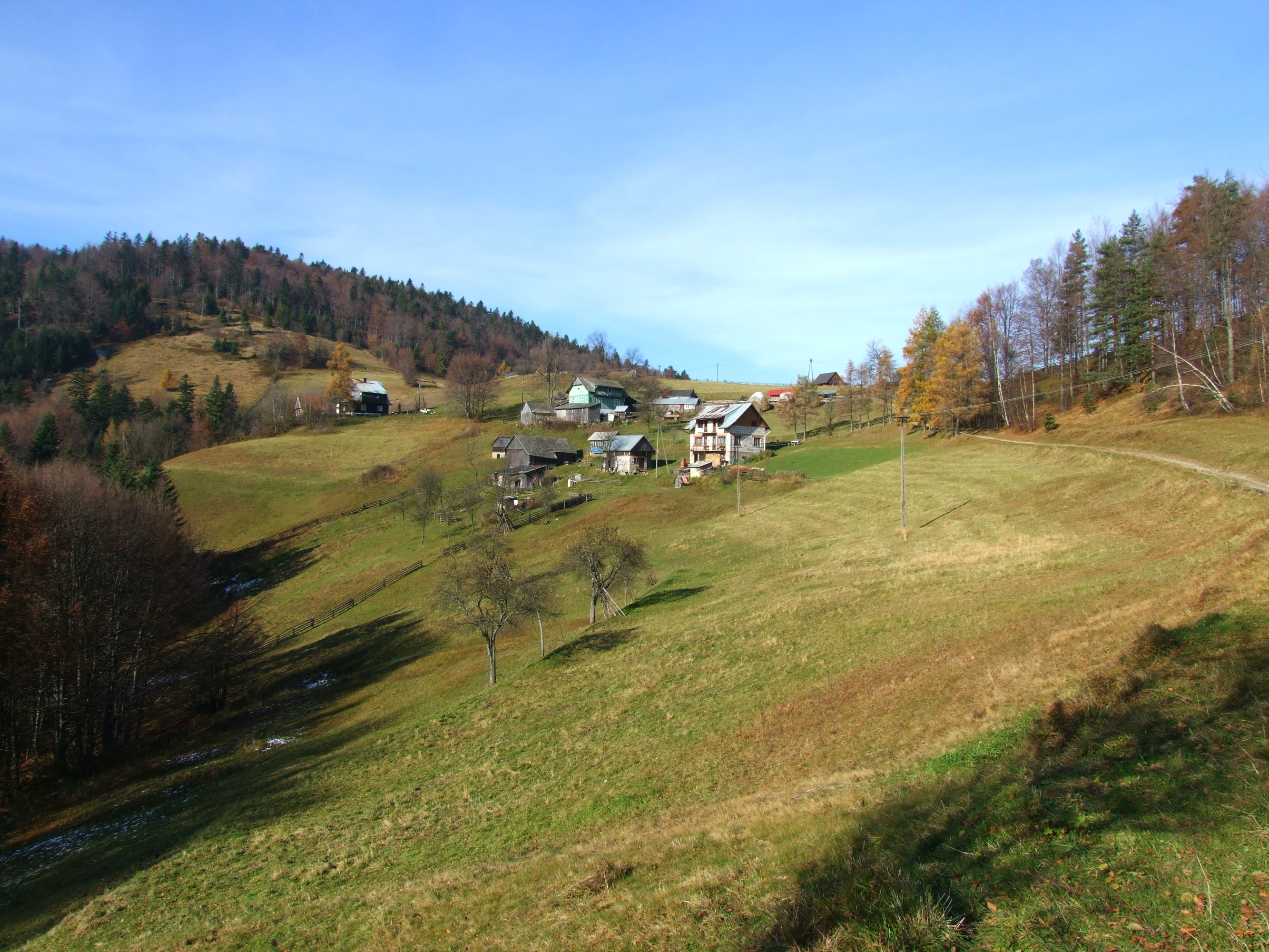 Przełęcz i polana Przysłop w Paśmie Radziejowej w Beskidzie Sądeckim. Po lewej stronie przełęczy Dzwonkówka